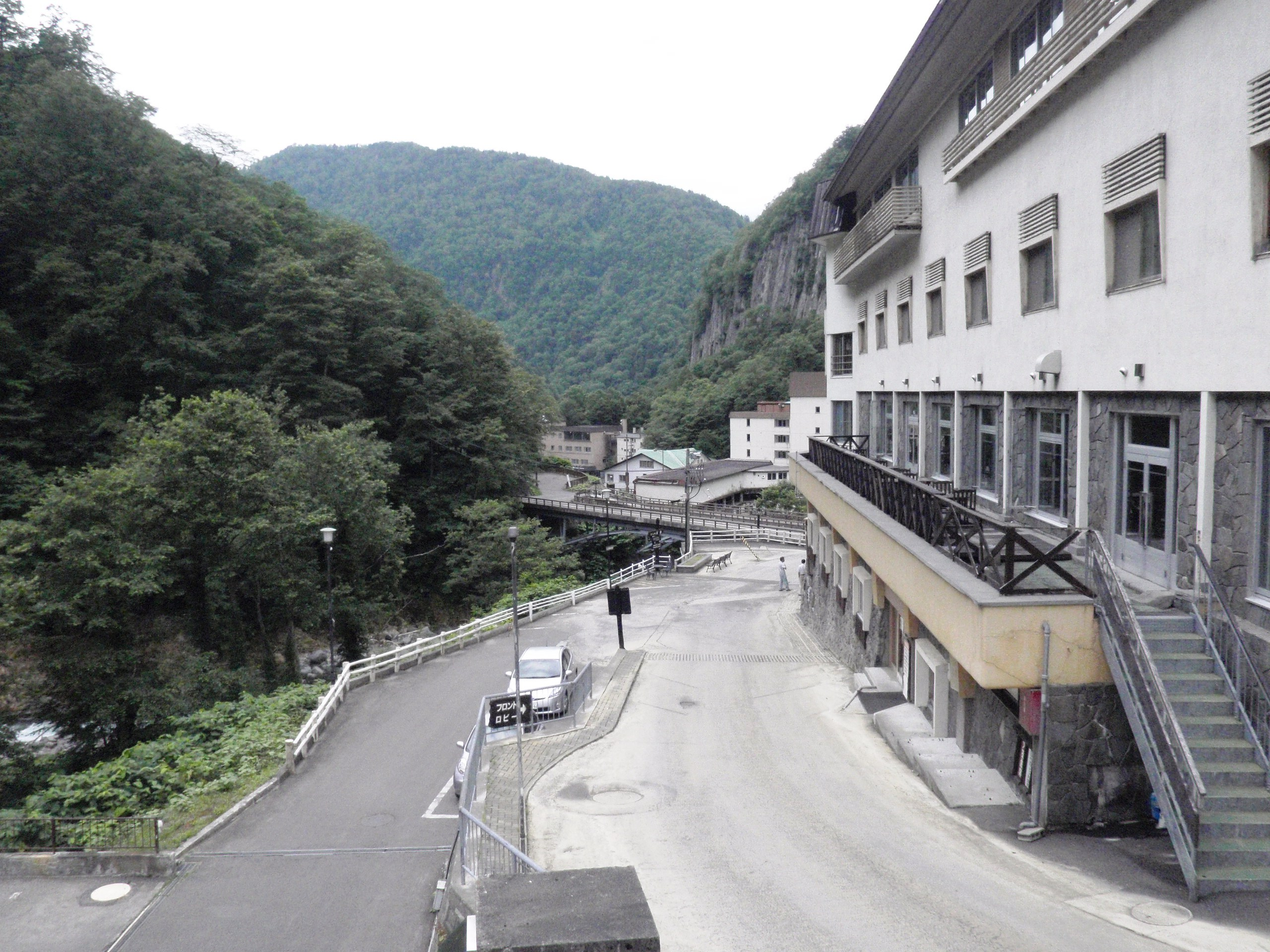 天人峡温泉街、天人閣駐車場屋上から下流側を撮影